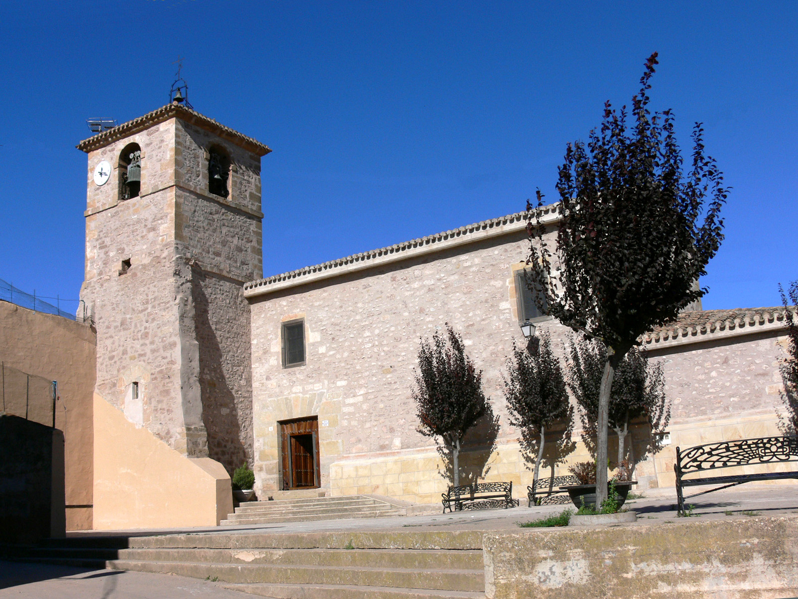 Iglesia de Santa Catalina en Hormilleja, La Rioja - España.